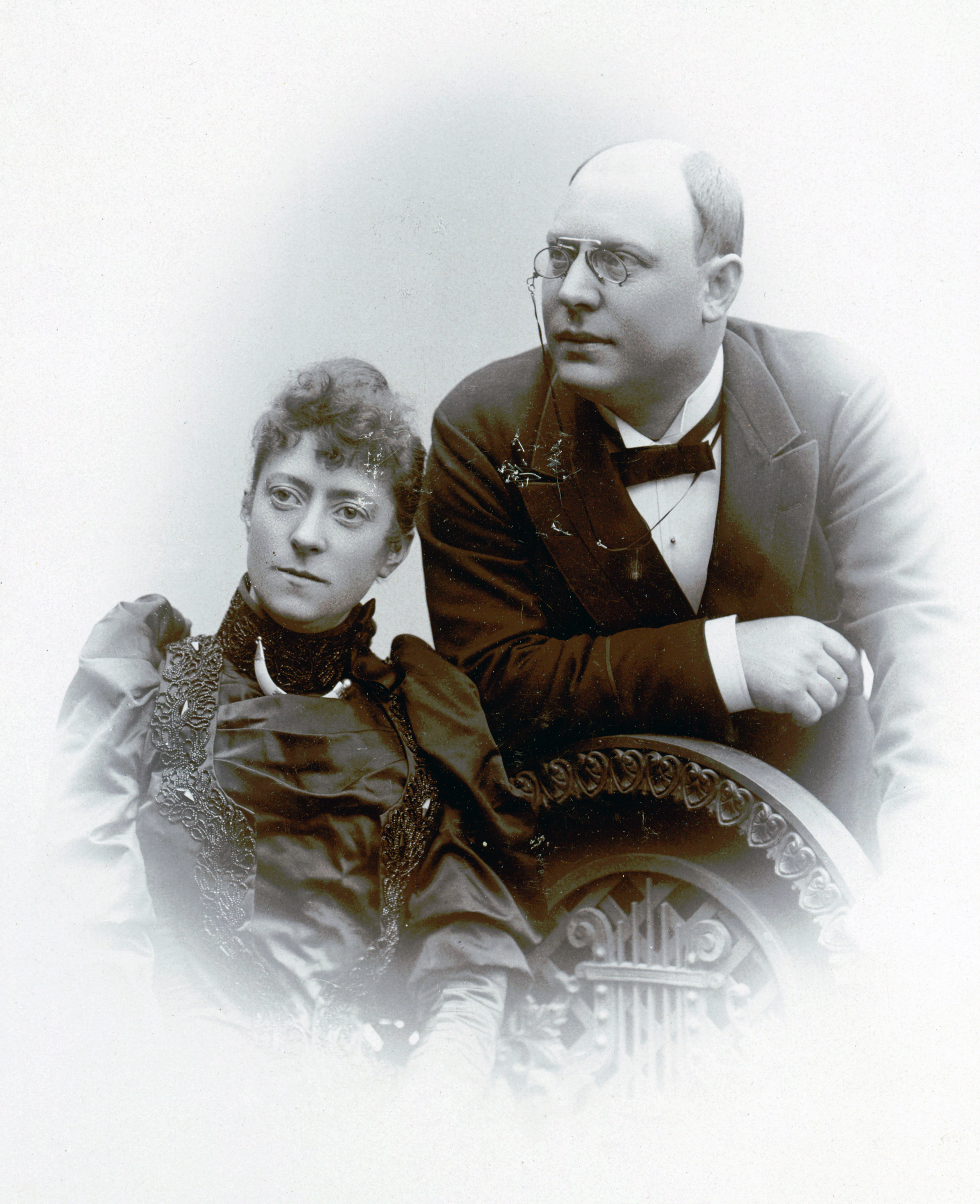 August & Constance Wahlgren, skådespelare och revyartister vid Stora teatern i Göteborg 1889-90